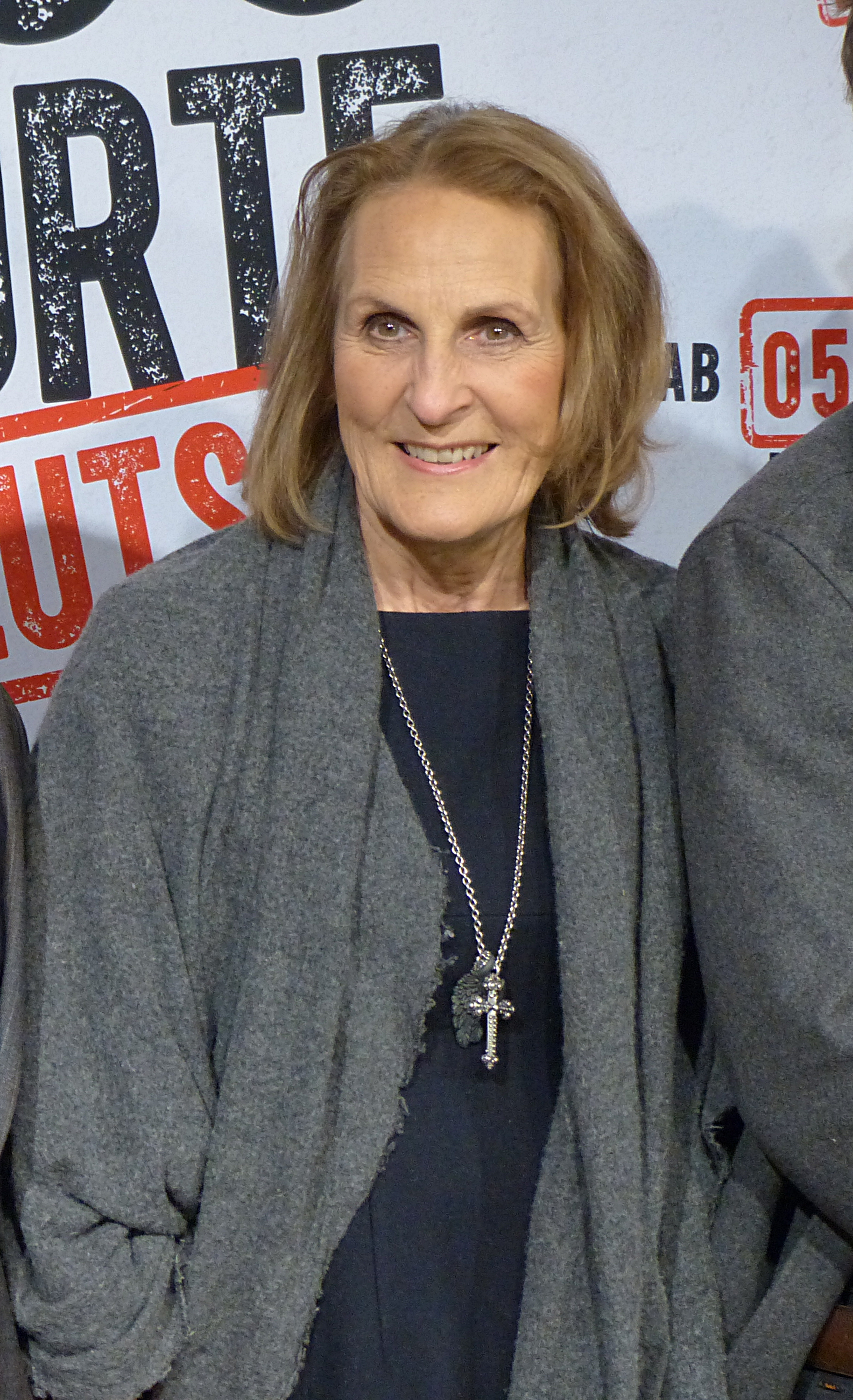 Dr. Gabriela Sperl bei der Premiere "300 Worte Deutsch", Januar 2015